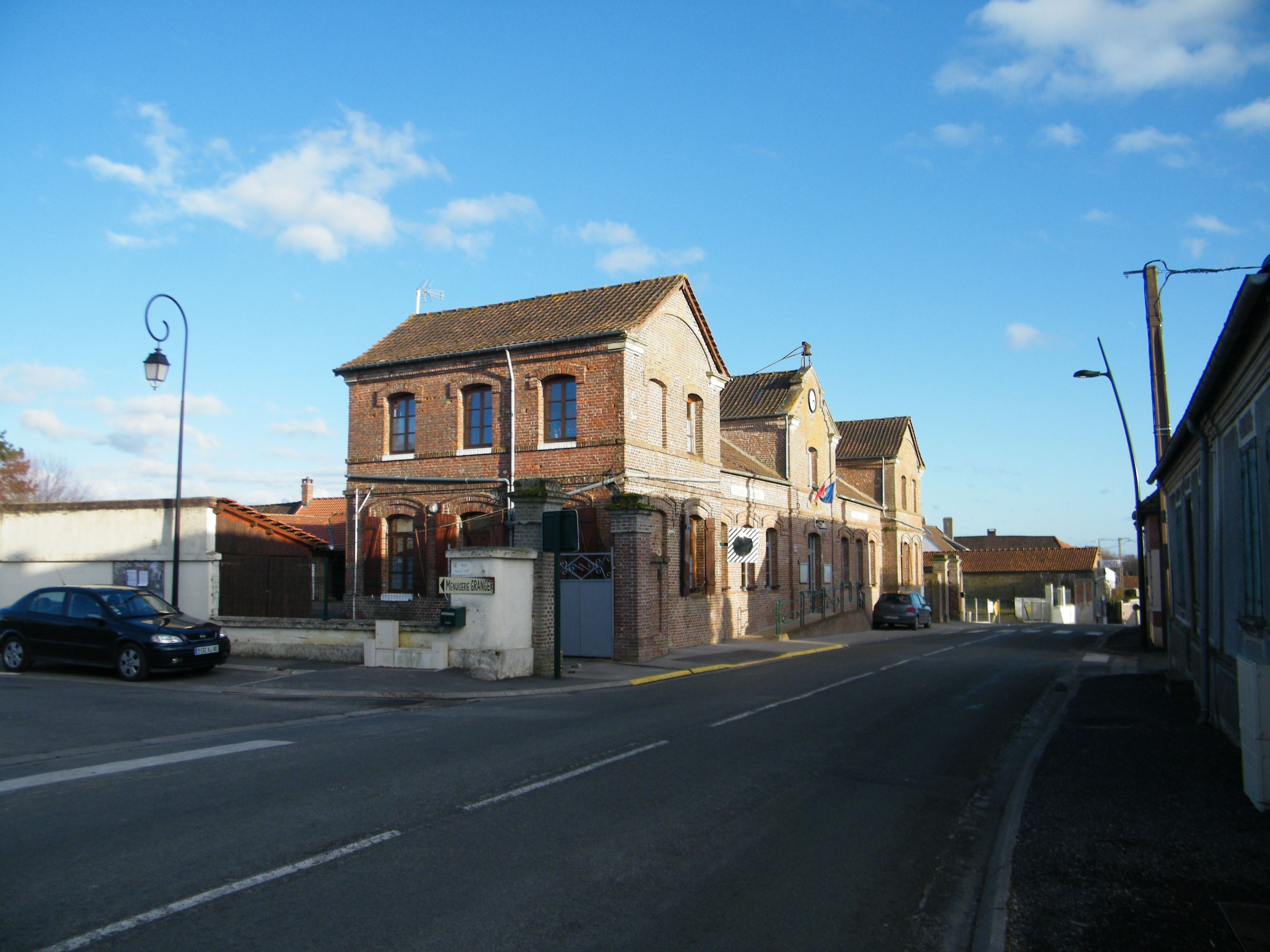 Mairie-école- Boismont